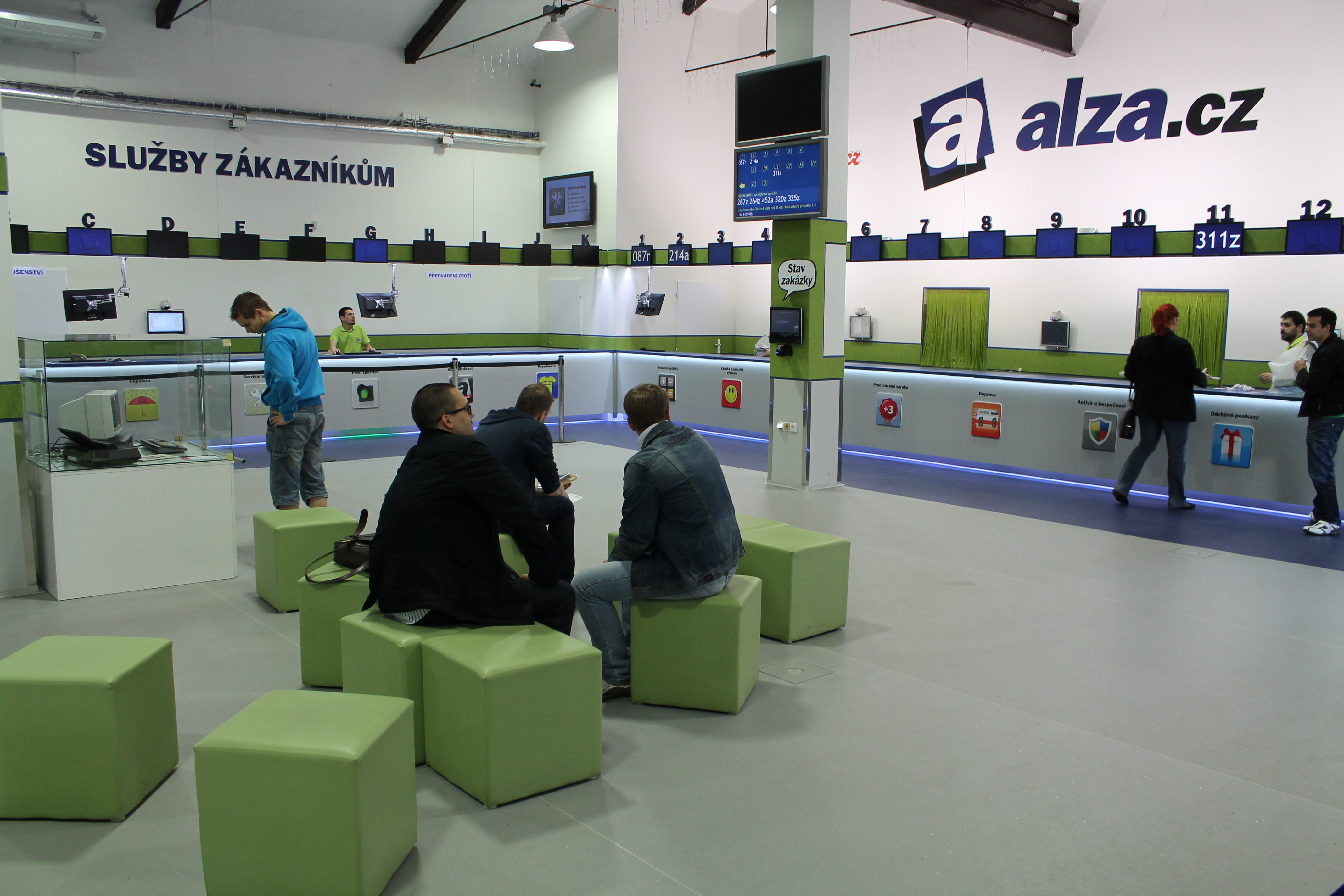 Výdej zboží - Alza.cz